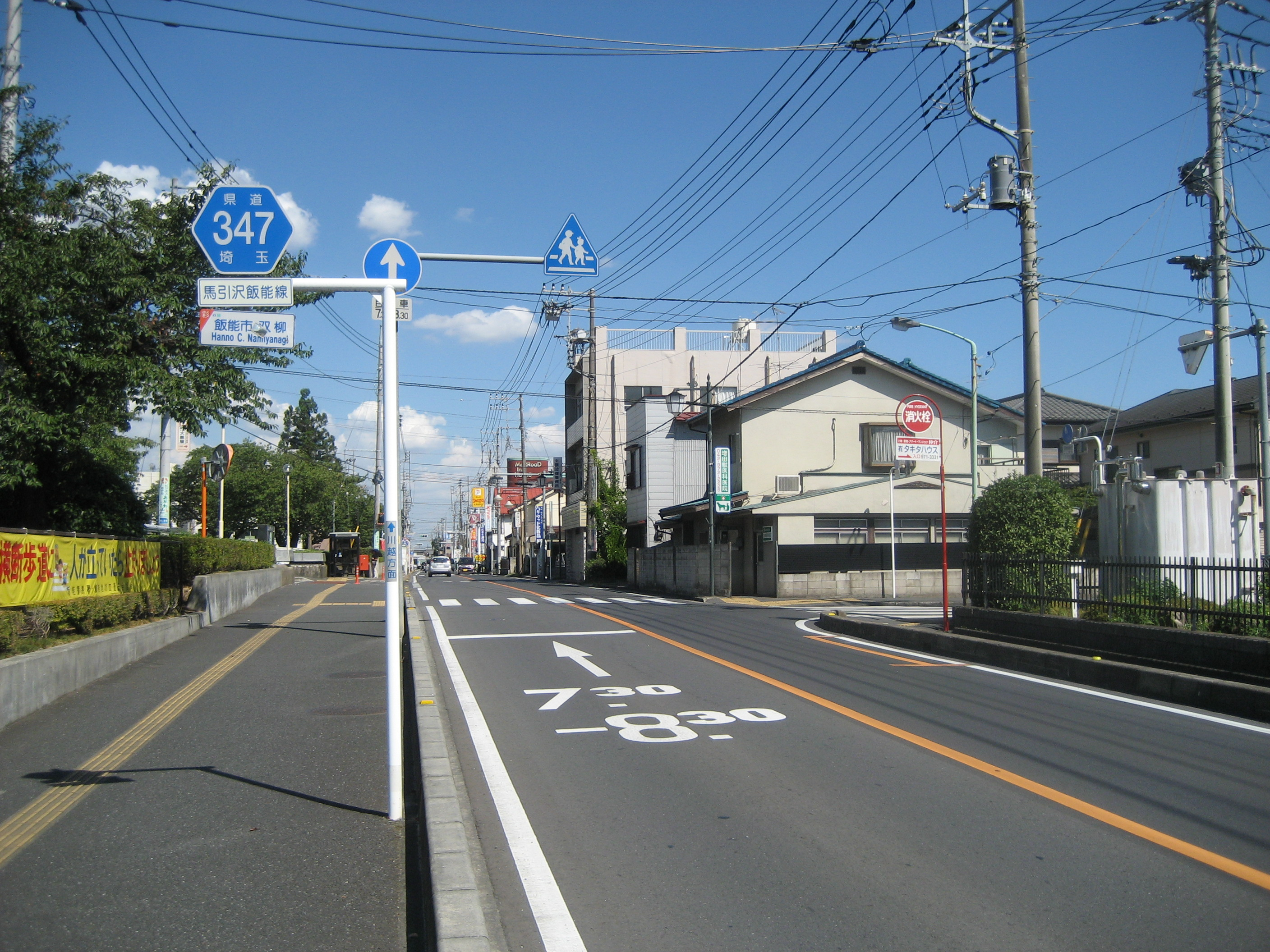 埼玉県道347号線飯能市飯能市役所付近